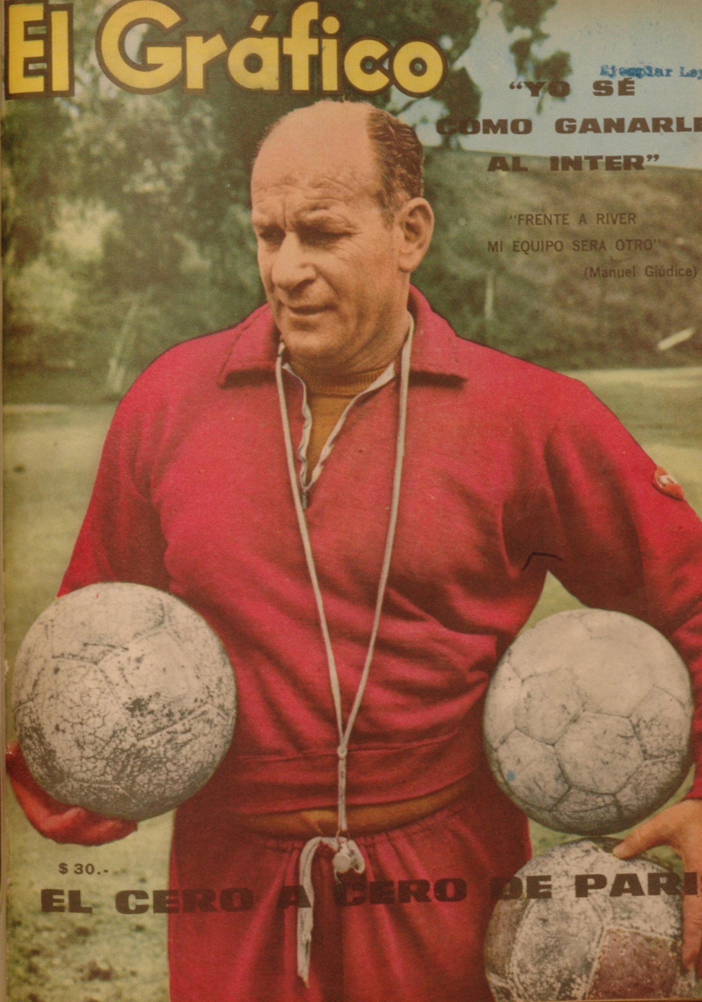 El Grafico del 08 de Junio de 1965. Edicion 2383